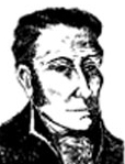 Retrato de José María Cos por autor anónimo.